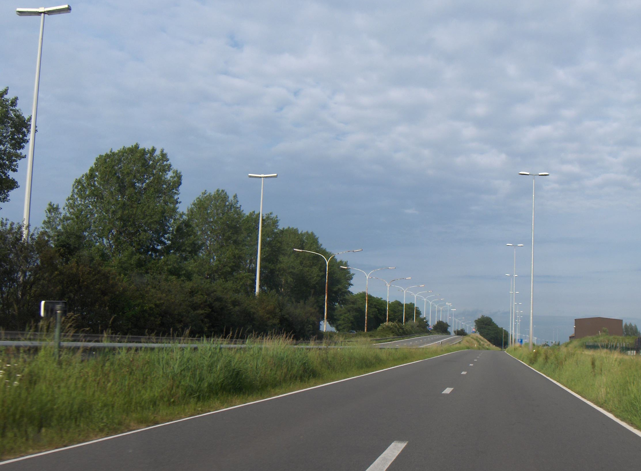 Beschreibung: Autobahn E34, Parallelstraße für den Lokalverkehr zwischen den Ausfahrten 10 und 11 in der Nähe von Sint-Gillis-Waas (Belgien, Prov. Ostflandern). Datum: 16. August 2006 Fotograf: Friedrich Tellberg